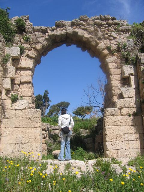 השער הראשי של מבצר כפרלט הצלבני.תמונה שצילמתי והעלתי במרץ 2006.אסף.צ 13:06, 3 מרץ 2006 (UTC) The main entrance to the crusader foretress Caferlet, Israel